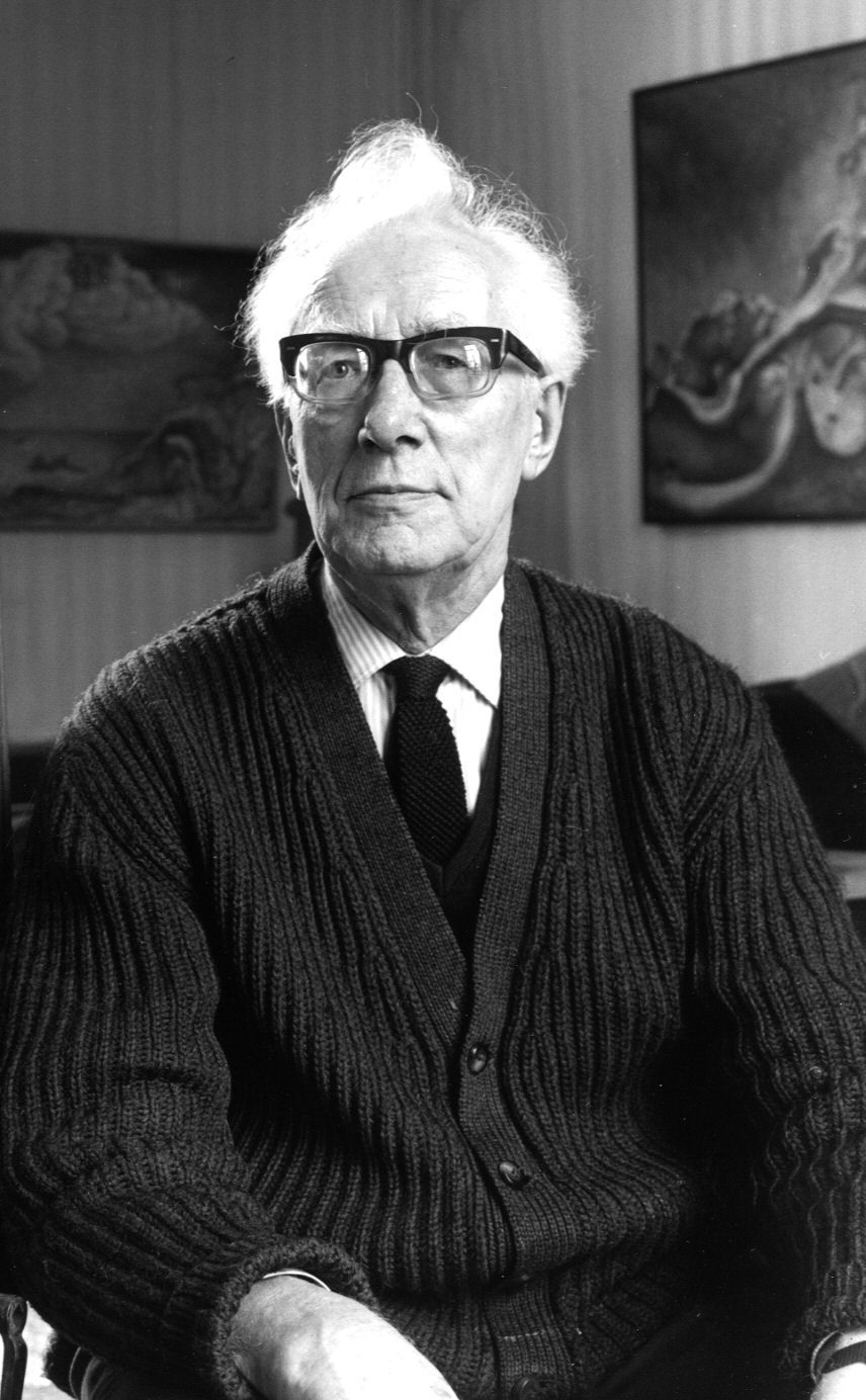 Portret van de Utrechtse kunstenaar Willem van Leusden (1886-1974) in zijn atelier in het huis Mariënhof (Diependaalsedijk 52) te Maarssen.